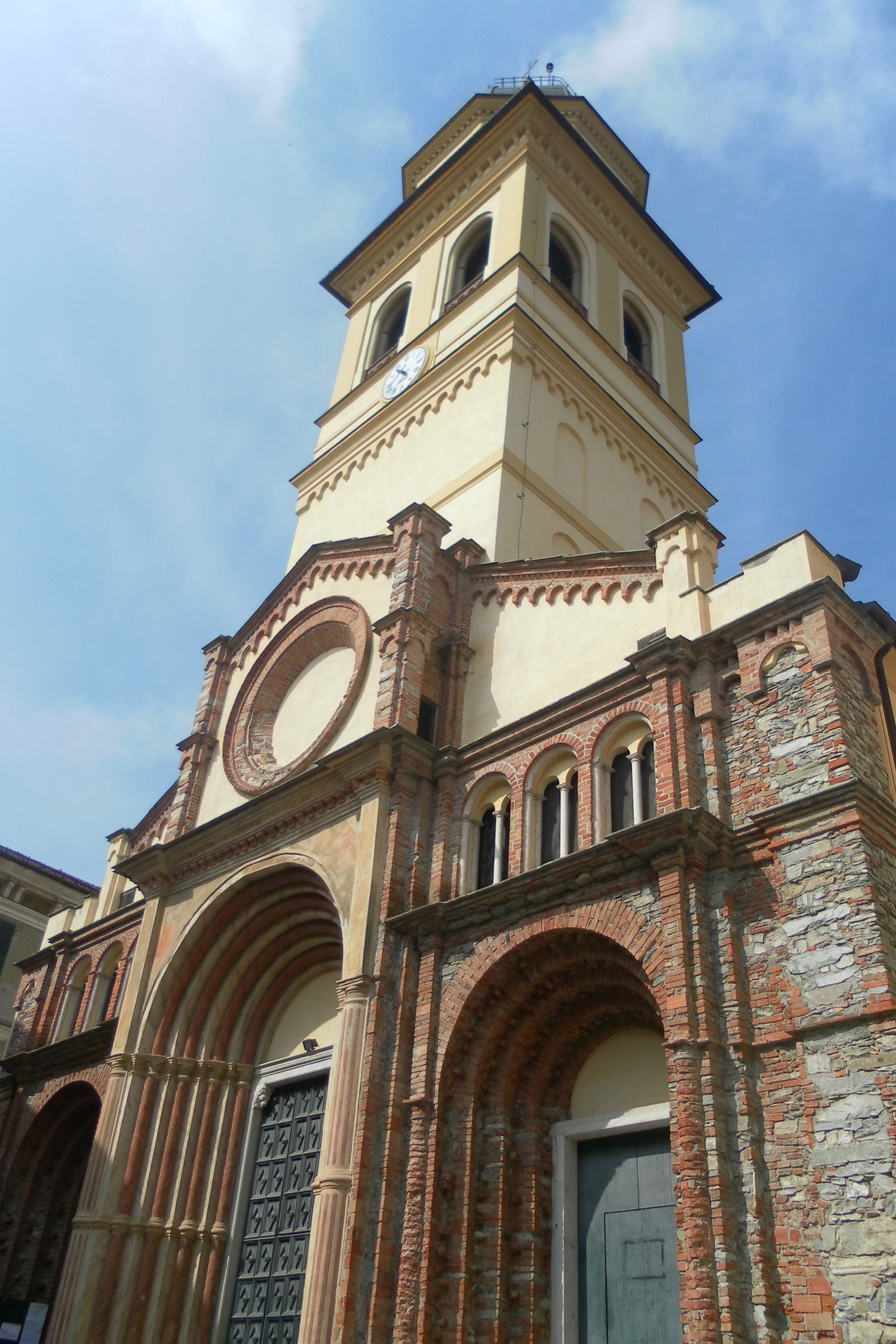 Voltaggio (AL)